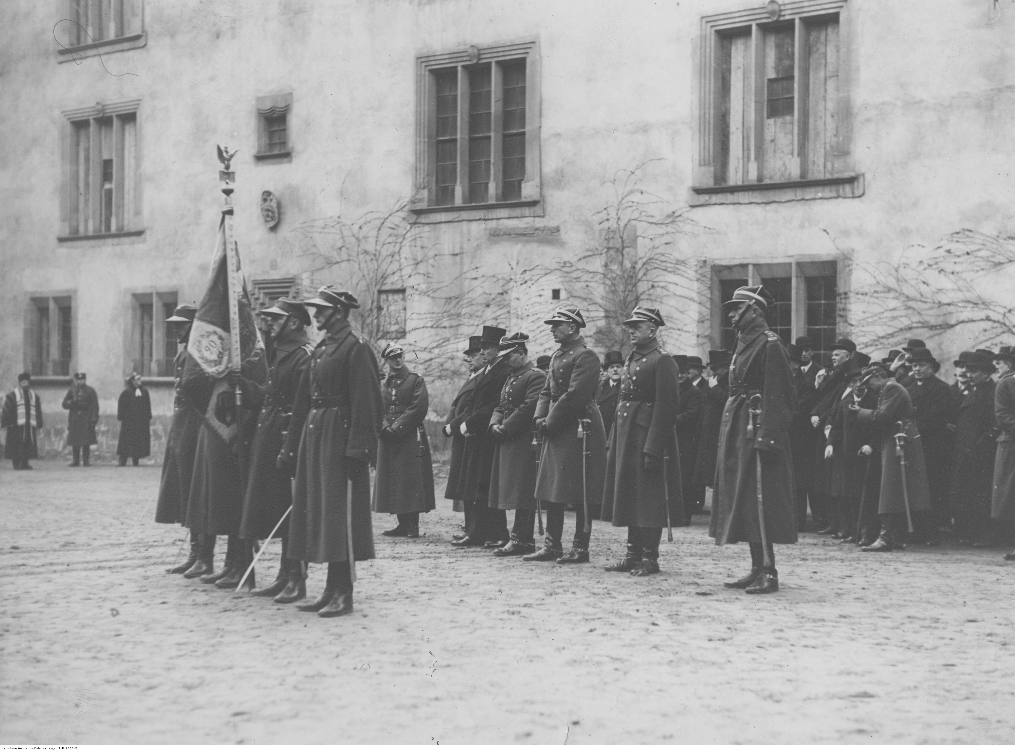 Obchody Święta Niepodległości w Krakowie. Przysięga rekrutów na dziedzińcu wawelskim. Widoczny sztandar 20 Pułku Piechoty Ziemi Krakowskiej. Widoczni m.in.: wojewoda krakowski Mikołaj Kwaśniewski, prezydent Krakowa Mieczysław Kaplicki, dowódca OKV Kraków generał Aleksander Narbut-Łuczyński, zastępca dowódcy OKV Kraków pułkownik Marian Bolesławicz. Koncern Ilustrowany Kurier Codzienny - Archiwum Ilustracji. Sygnatura: 1-P-2988-2